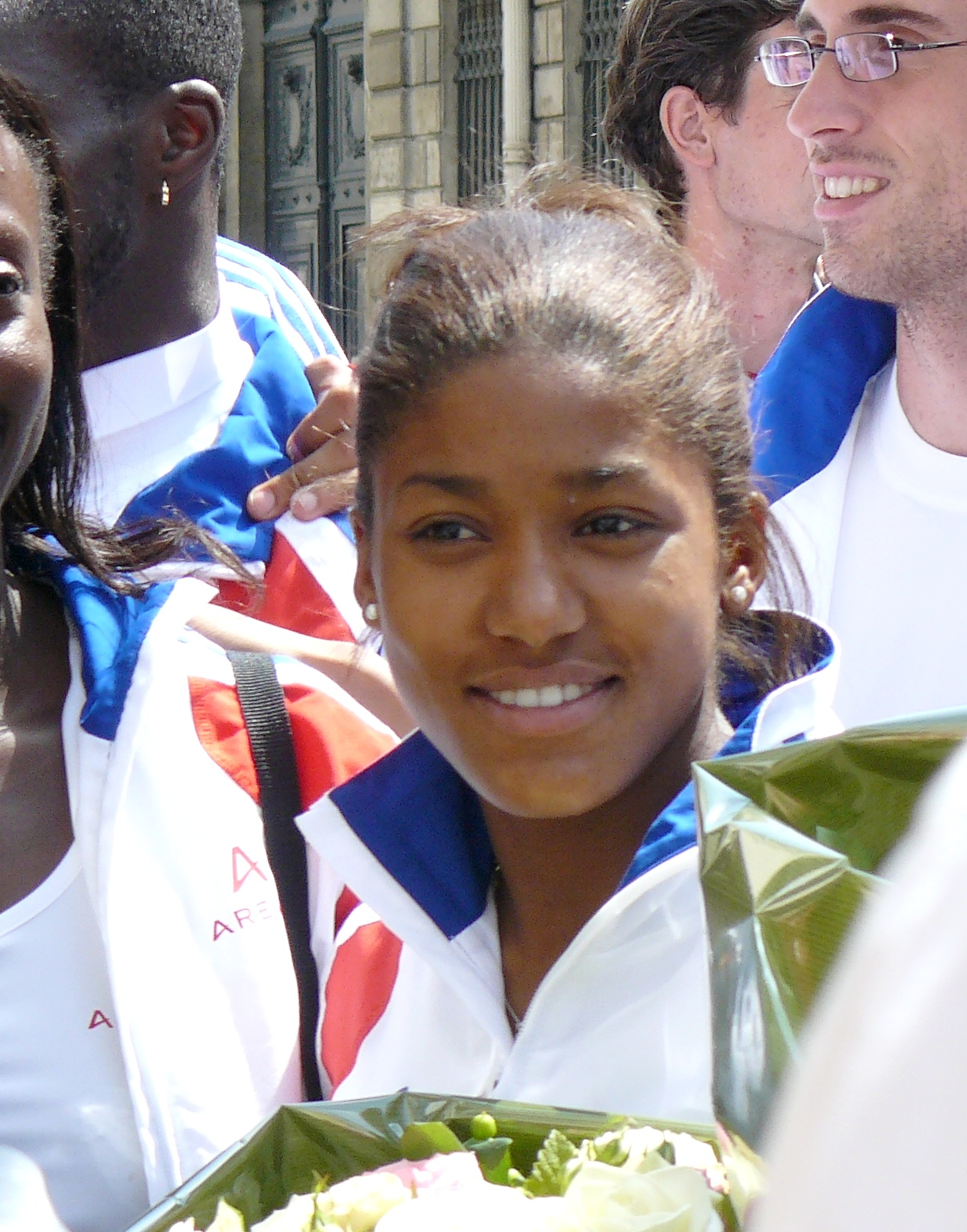 Nelly Banco, athlète française (sprint), lors de la réception à l'Élysée des médaillés de Barcelone , le 3 août 2010.